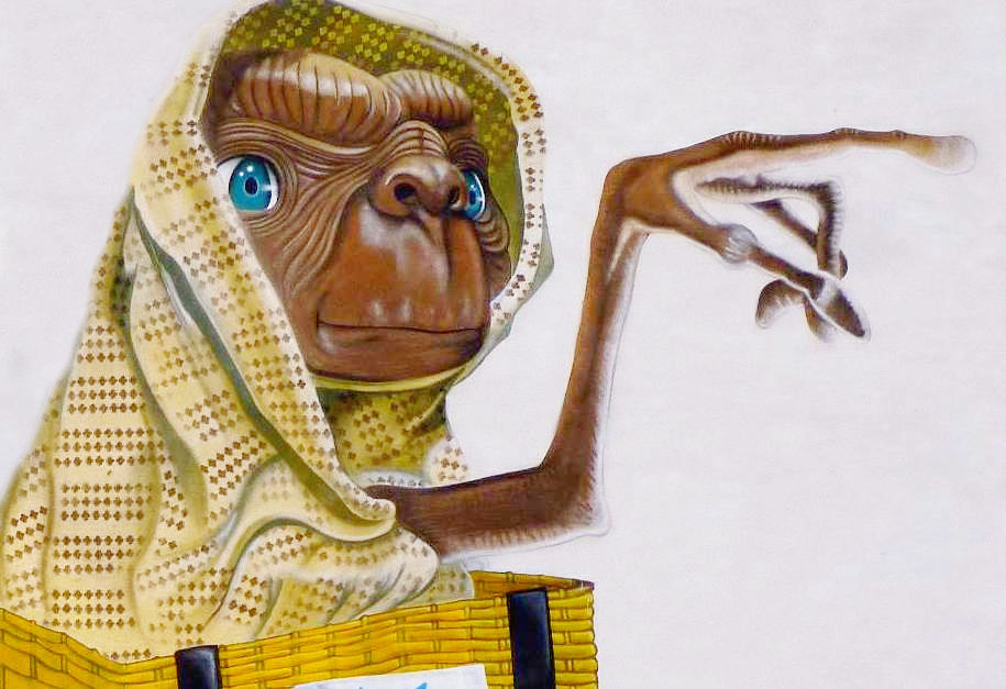 Ponferrada - graffiti & murals